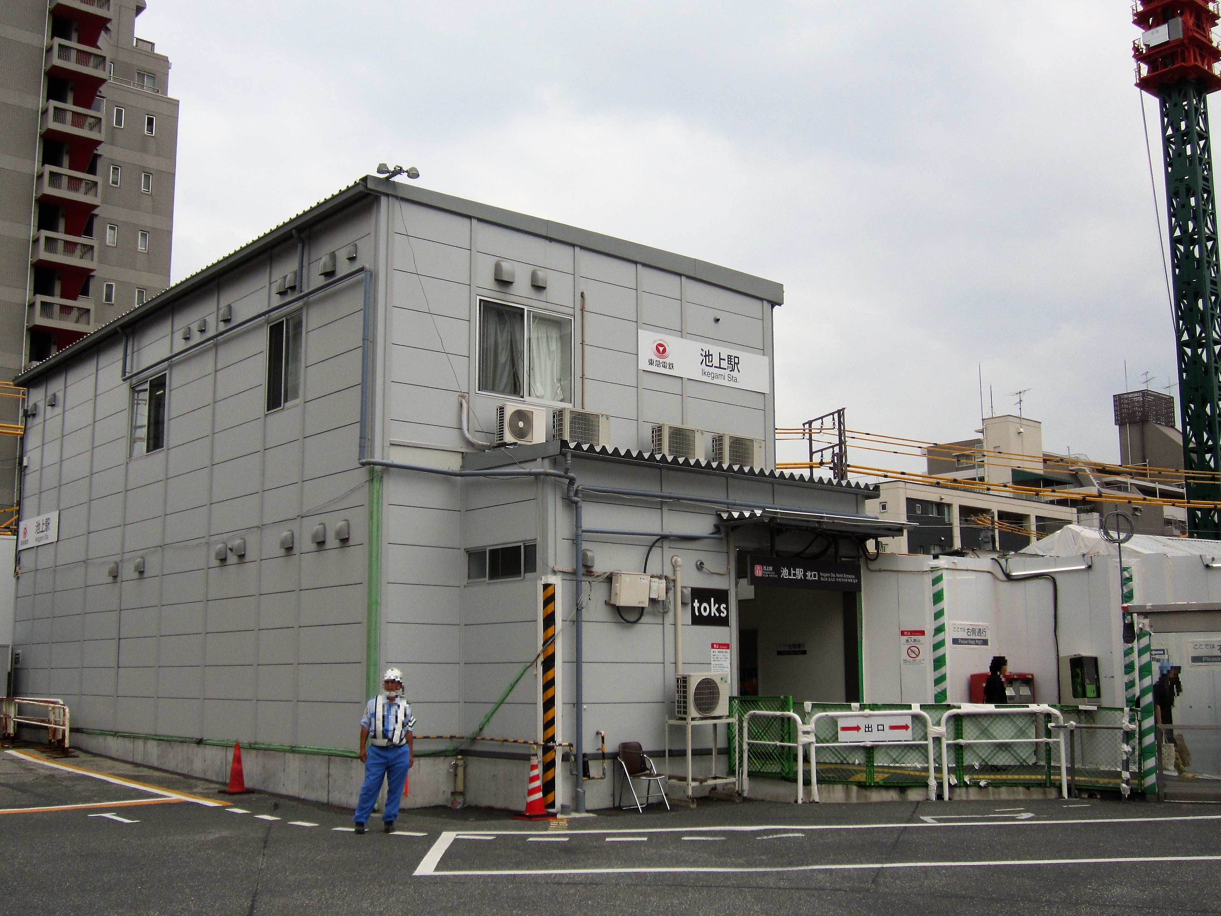 池上駅仮駅舎（2019年6月）